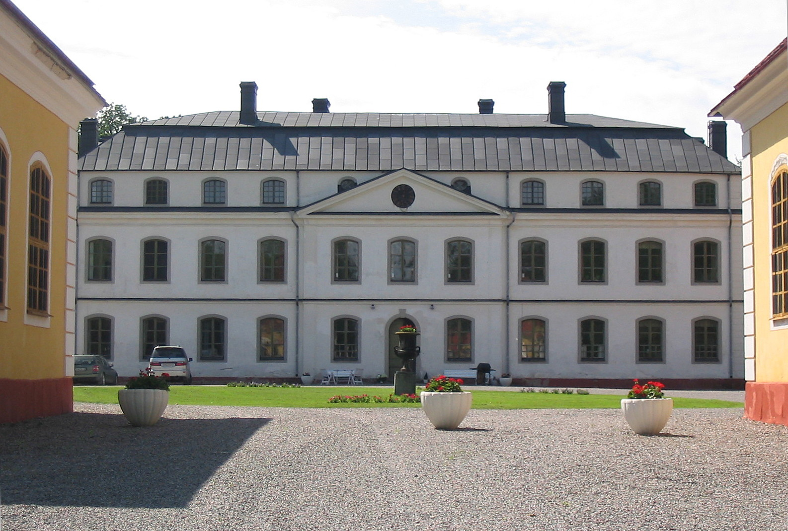 fotat av tursit (användare Tompen0000 på wikipedia), 2004.